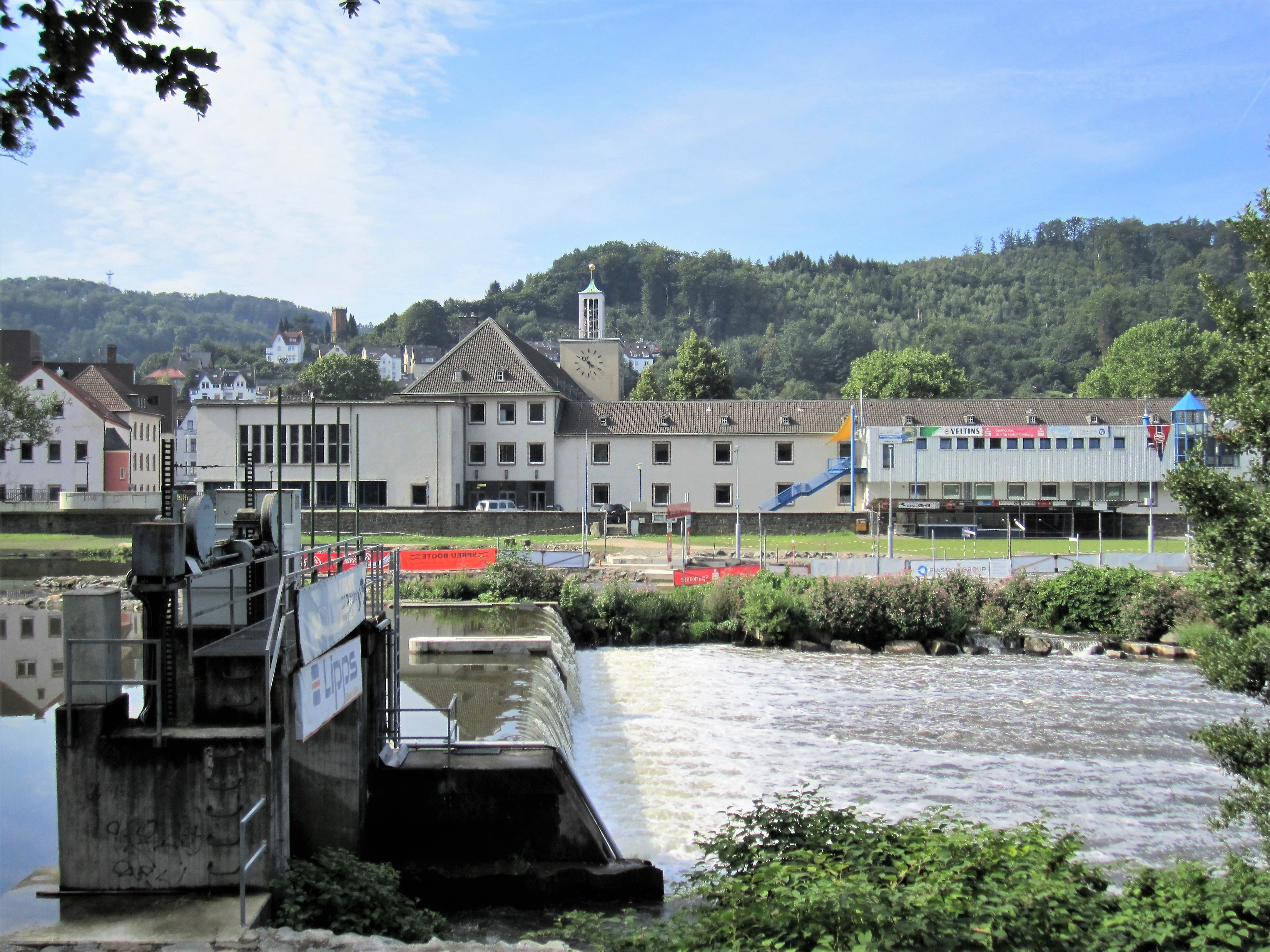 Blick vom Mühlenberg über das Lennewehr und den Startbereich des Wildwasserparks auf das Rathaus im Hagener Stadtteil Hohenlimburg. Im rechten oberen Vorbau befindet sich das Leistungszentrum für die Kanu-Slalom-Strecke. Im linken Gebäudeanbau der Rathaussaal und darüber im Hintergrund am Berghang erkennt man den historischen Wasserturm oberhalb der Boeingstraße.